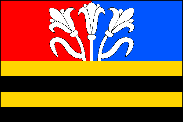 vlajka, Výkleky, okres Přerov